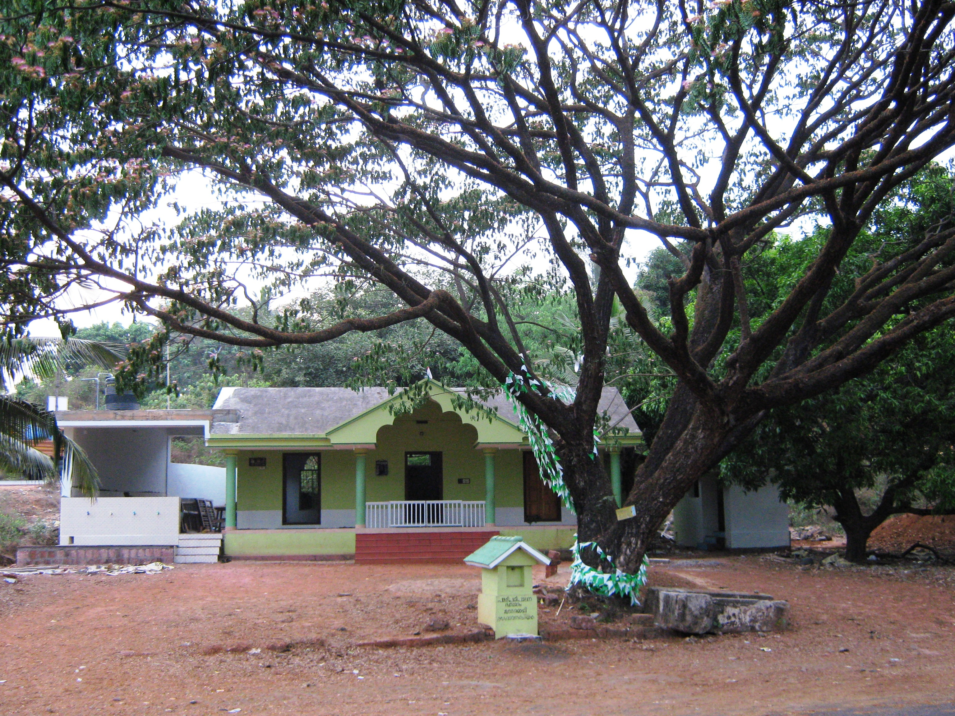 Kasaragod, Kerala, India.